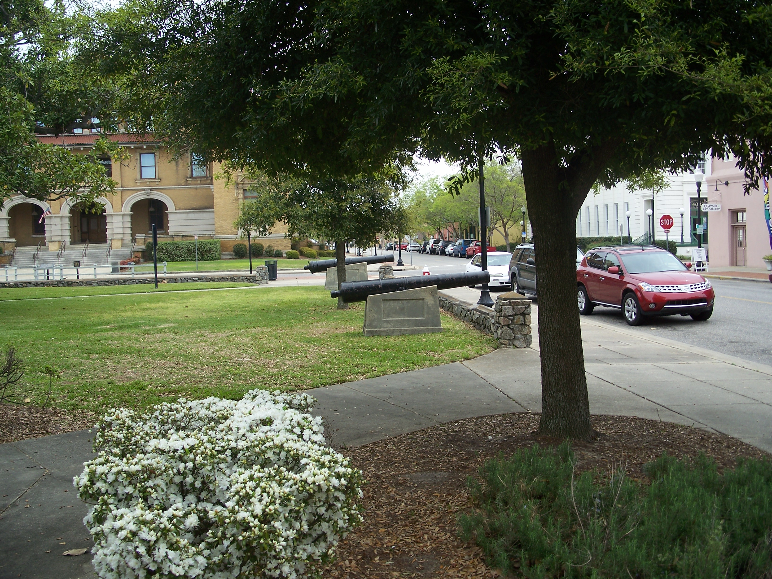 Pensacola, Florida: Plaza Ferdinand VII.